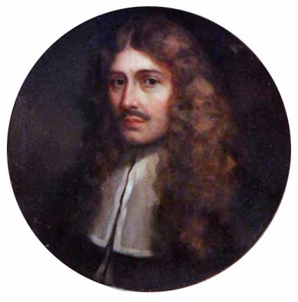 Portrait de Gian Francesco Buonamico